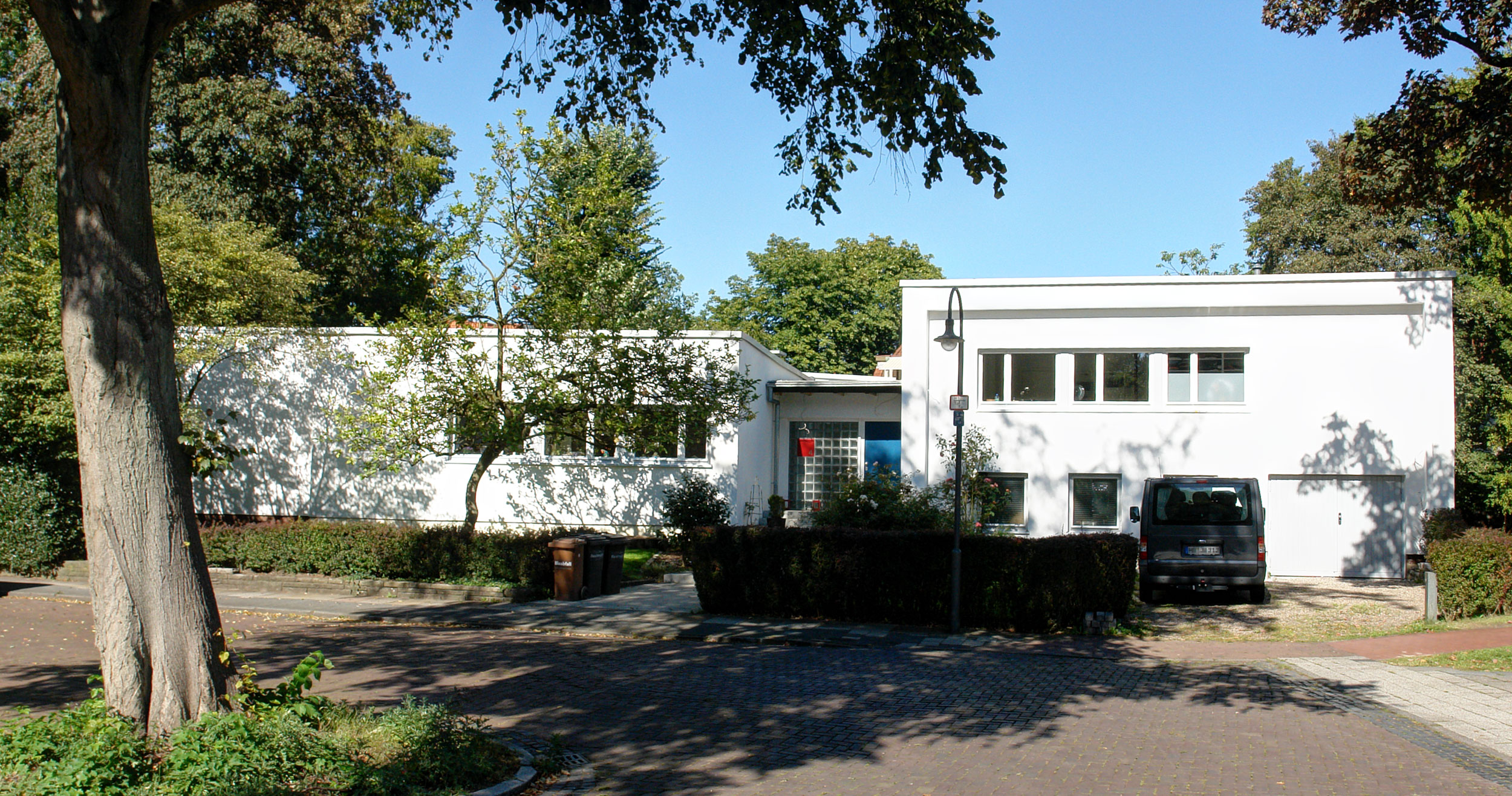 Bürohaus in Bremen, Kohlmannstraße 4Das abgebildete Objekt ist ein geschütztes Kulturdenkmal in der Freien Hansestadt Bremen, mit der Nr. 0719 beim Landesamt für Denkmalpflege registriert.